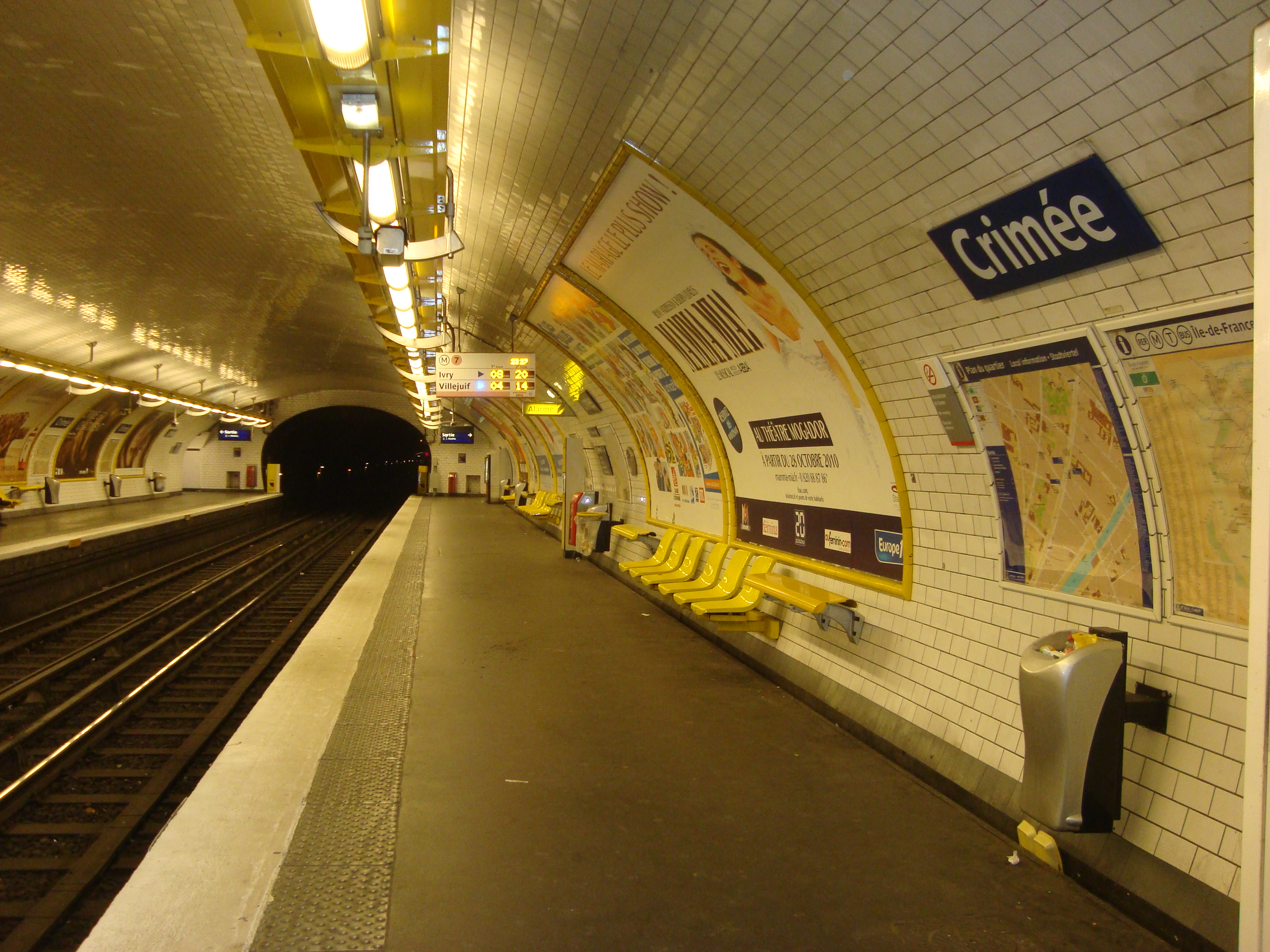 Les quais de la station de métro Crimée sur la ligne 7.